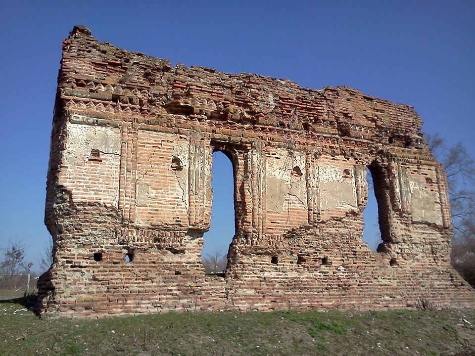 Ruinele bisericii lui Mihnea Turcitul-Biserica Roșie